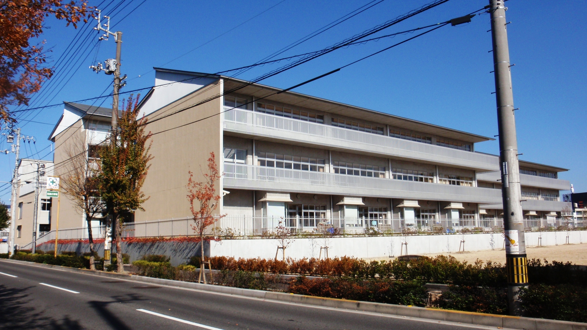 香川県にある高松市立高松第一小学校・中学校。